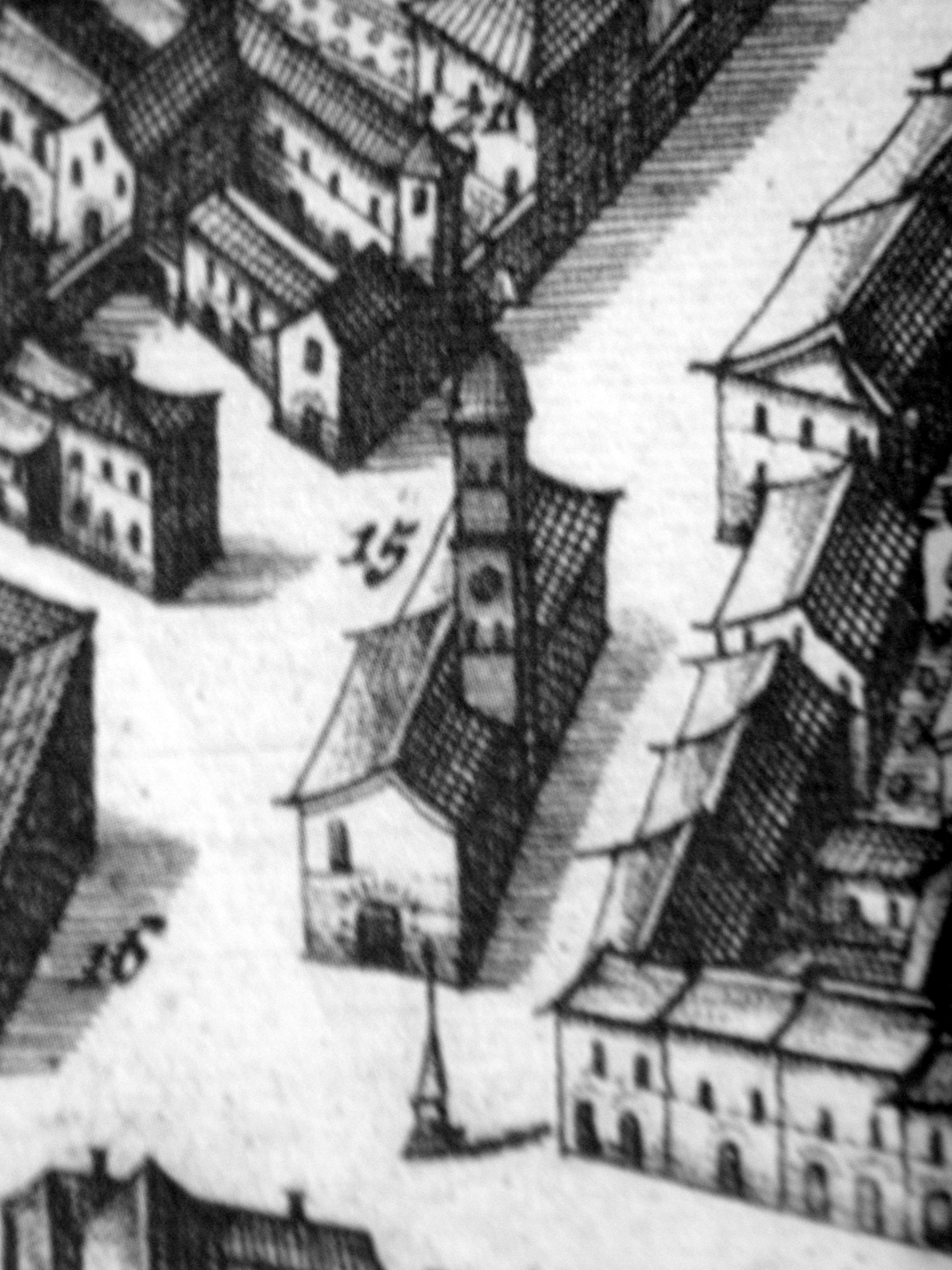 Pierre Mortier; antica mappa di Rovigo: dettaglio, la demolita Chiesa di santa Giustina, nell'odierna piazza Giuseppe Garibaldi.